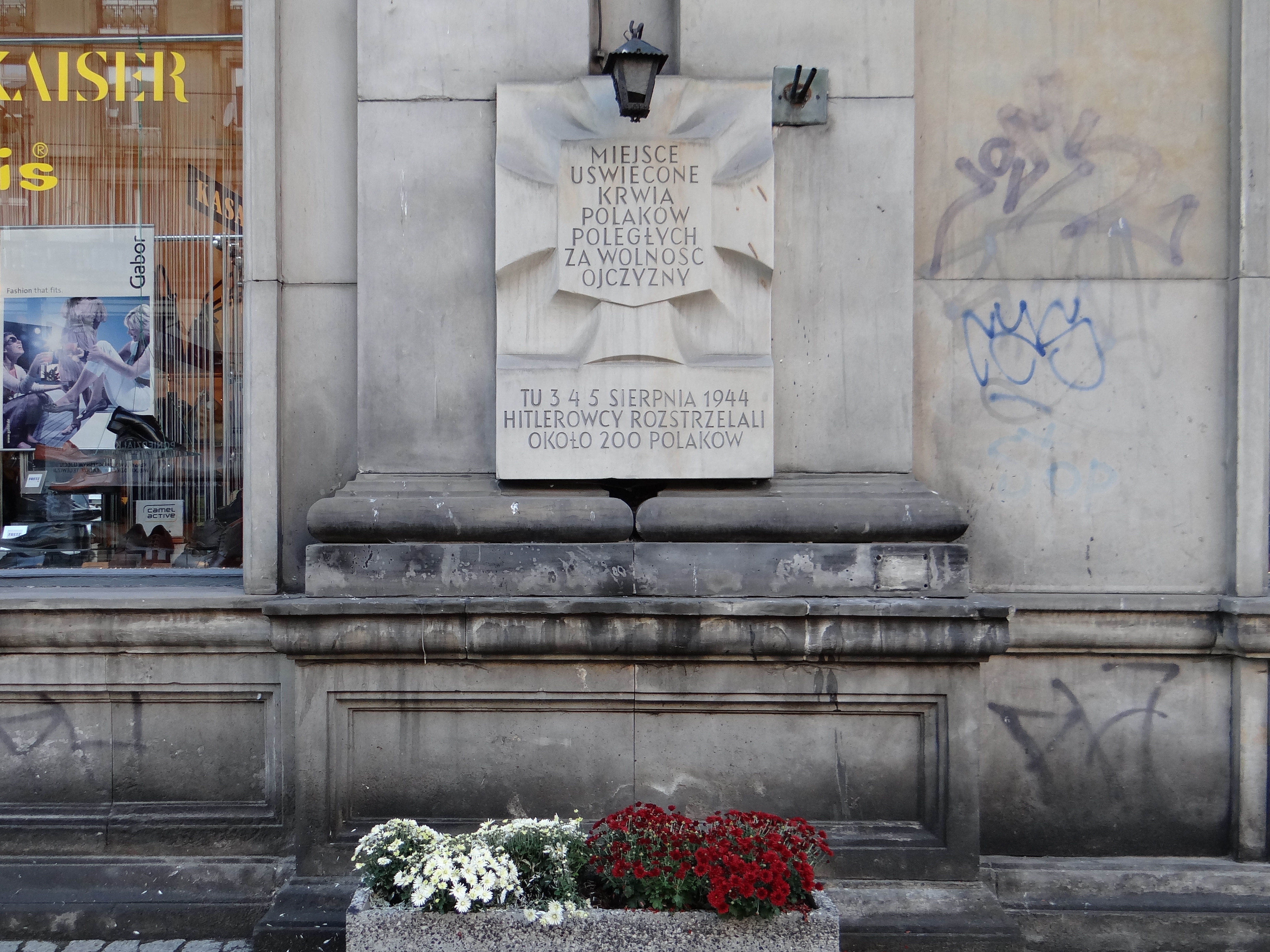 Miejsce Pamięci Narodowej przy ul Marszałkowskiej 27/35 w Warszawie